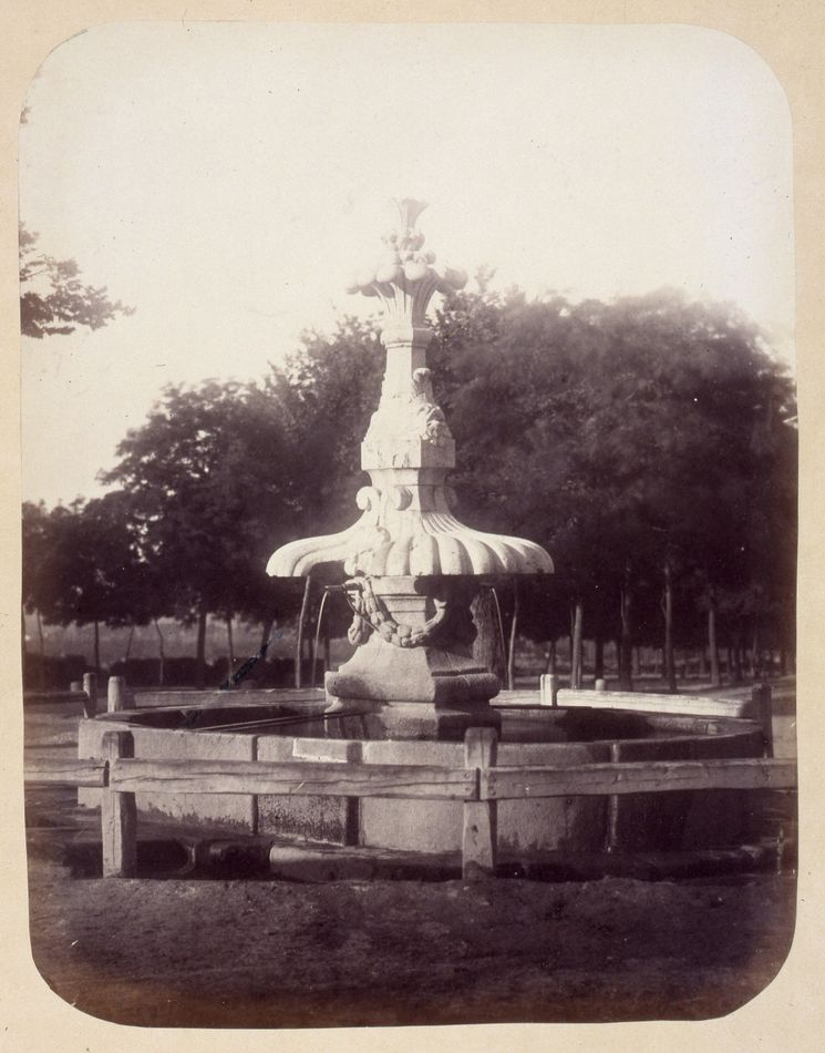 Fuente en el paseo de las Delicias de Madrid. Obra en 1864 del fotógrafo toledano Alfonso Begué, muerto el 31 de octubre de 1865. Cartulina sepia. Albúmina. 43 x 32 cm. Fotografía contenida en un álbum procedente del Archivo de Villa y trasladado al Museo de Historia en 1983.